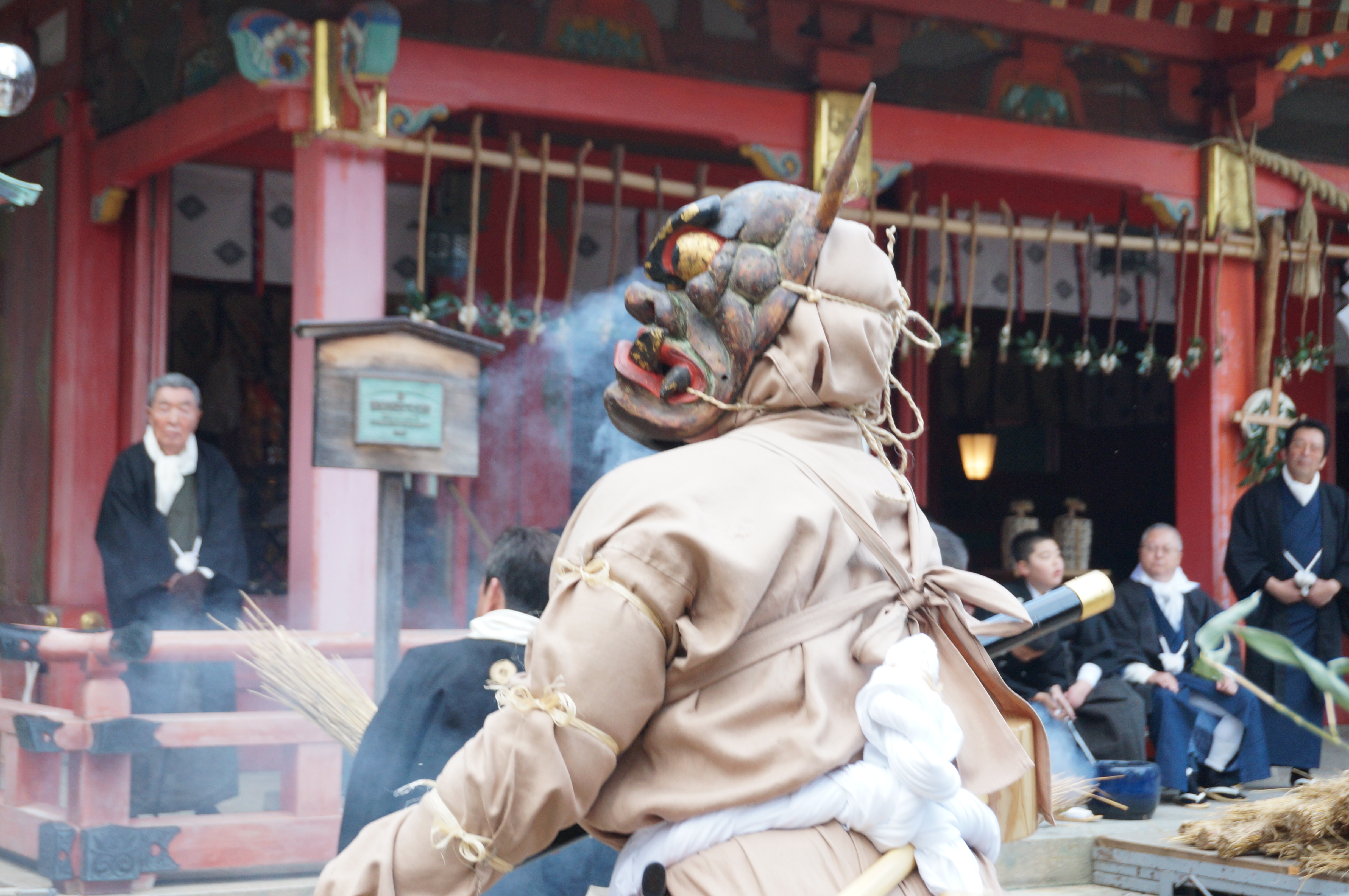 Shirikujiri oni ( le démon perceur de fesses)